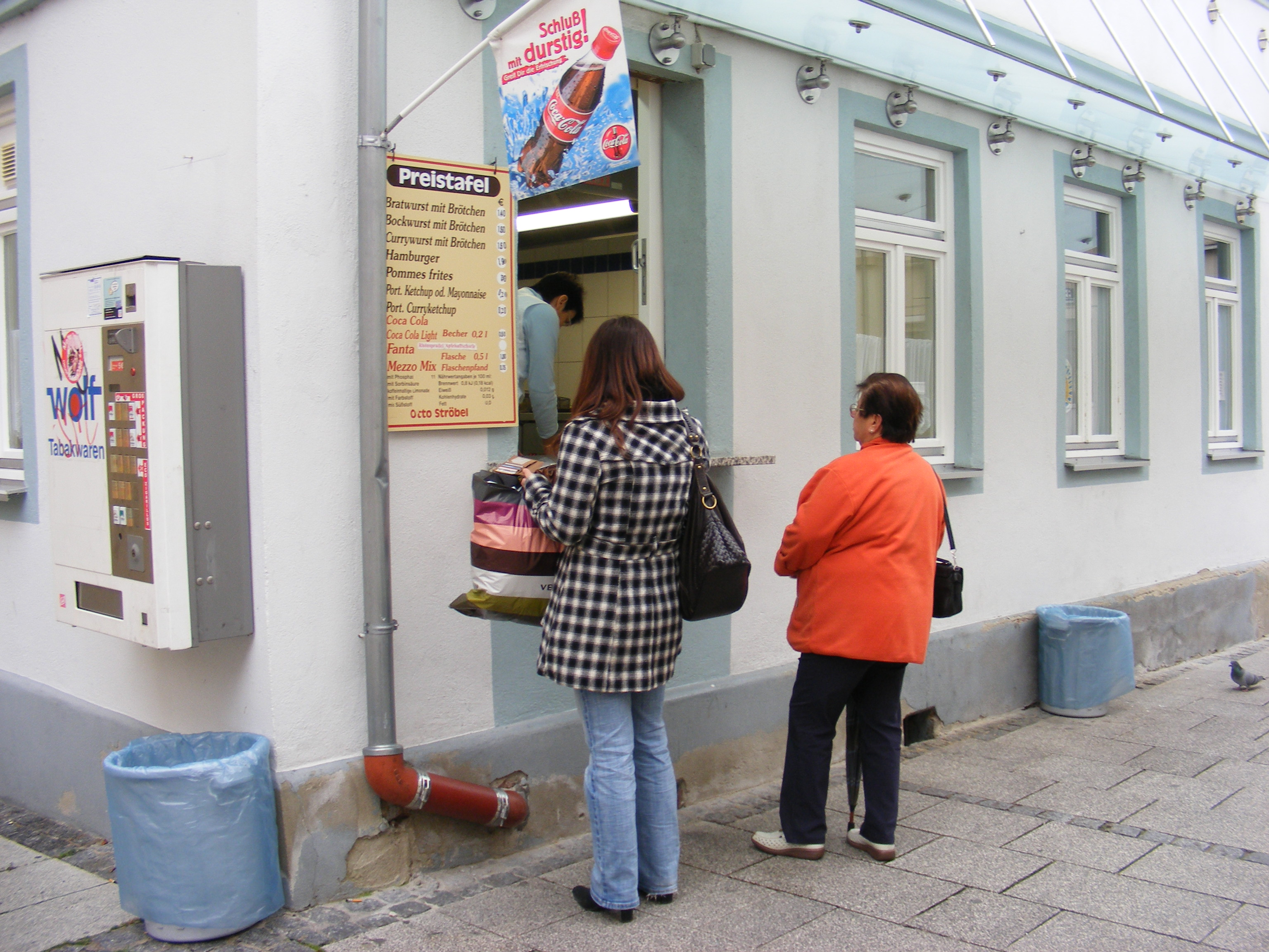 Gassenschänke in Bad Kissingen mit Gästen.